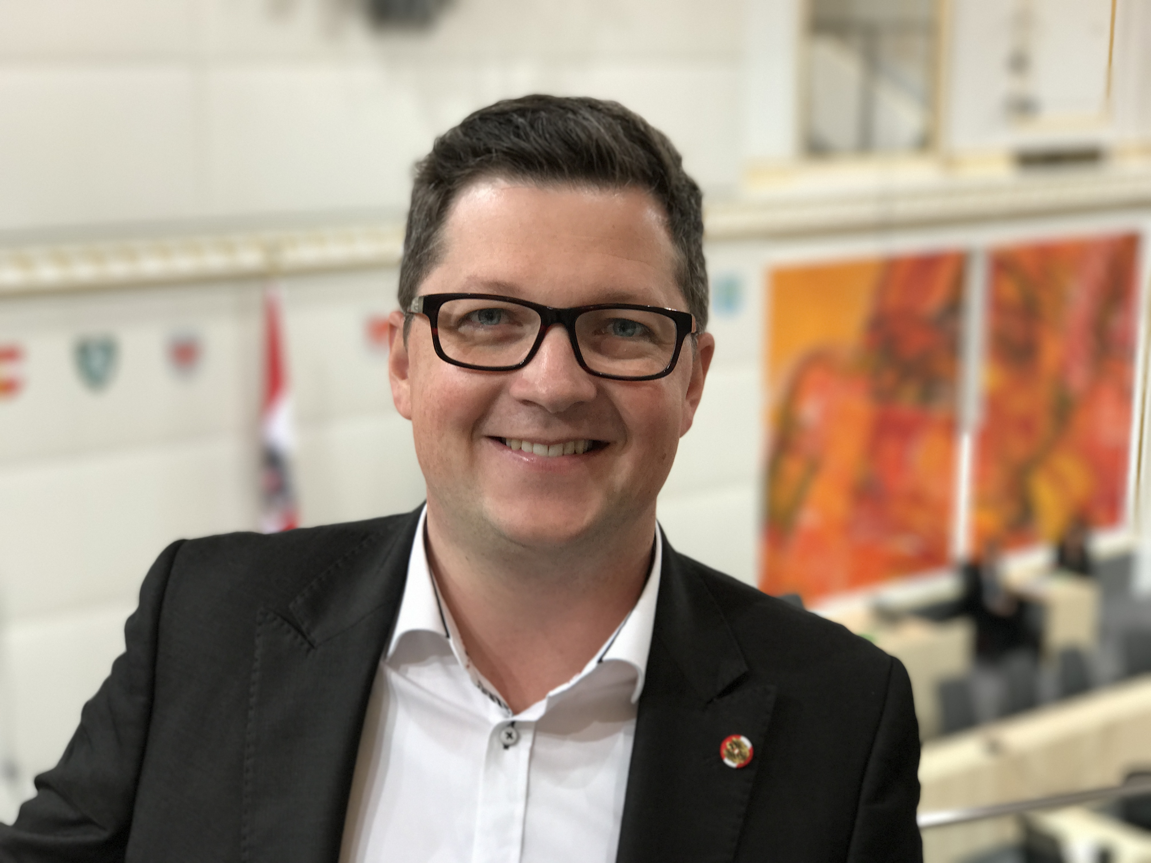 Michael Lindner im Bundesratssitzungssaal